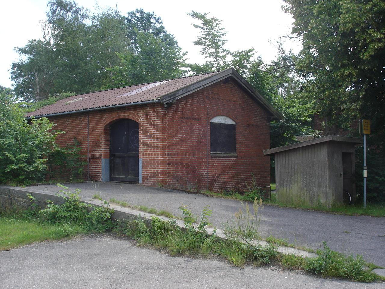 Vedde station, varehuset